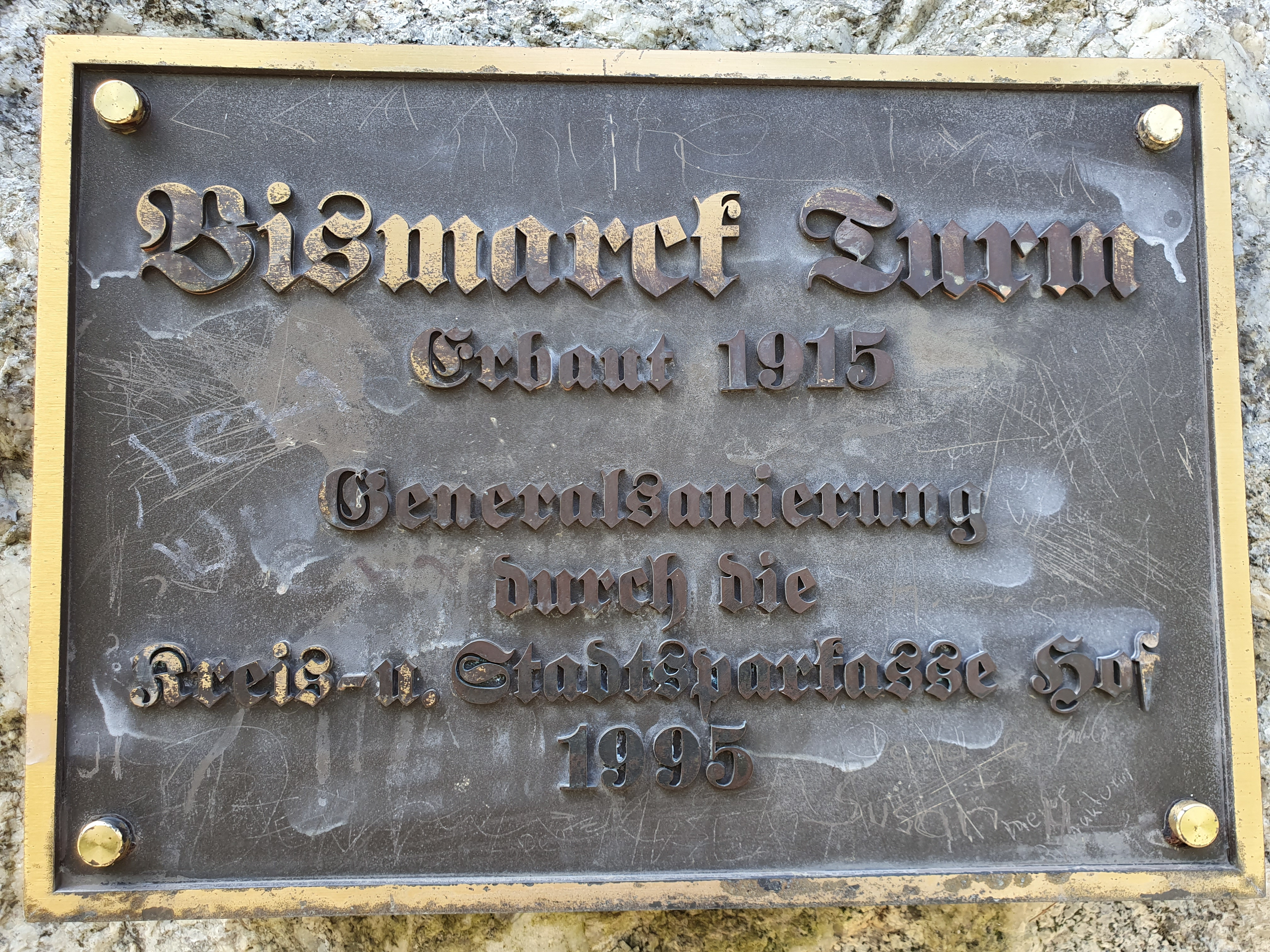 Informationsschild am Bismarckturm.